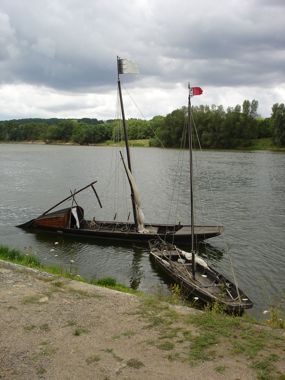 futreau de loire